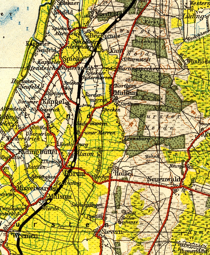 Straßen in Land Wursten. Noch fehlt das Stück der Reichsstraße 6 zwischen Midlum und Holßel